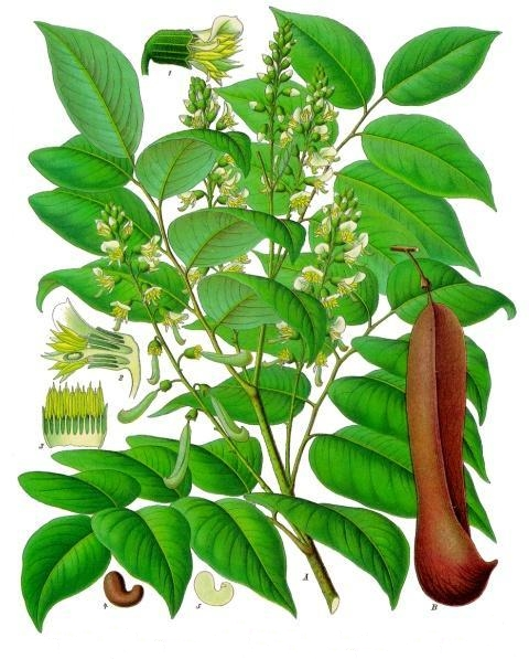 Tolu-Balsambaum. A Blüthenzweig, natürl. Grösse; B Fruchthülse, desgl.; 1 Blüthe, vergrössert; 2 dieselbe im Längsschnitt, desgl.; 3 Kelch mit Staubgefässring, auseinandergelegt, desgl.; 4 Same, natürl. Grösse; 5 derselbe zerschnitten, desgl.